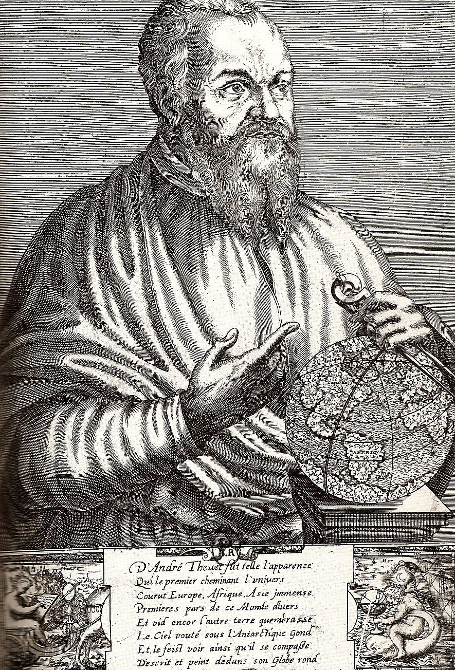 portrait d'André Thevet par Thomas de Leu